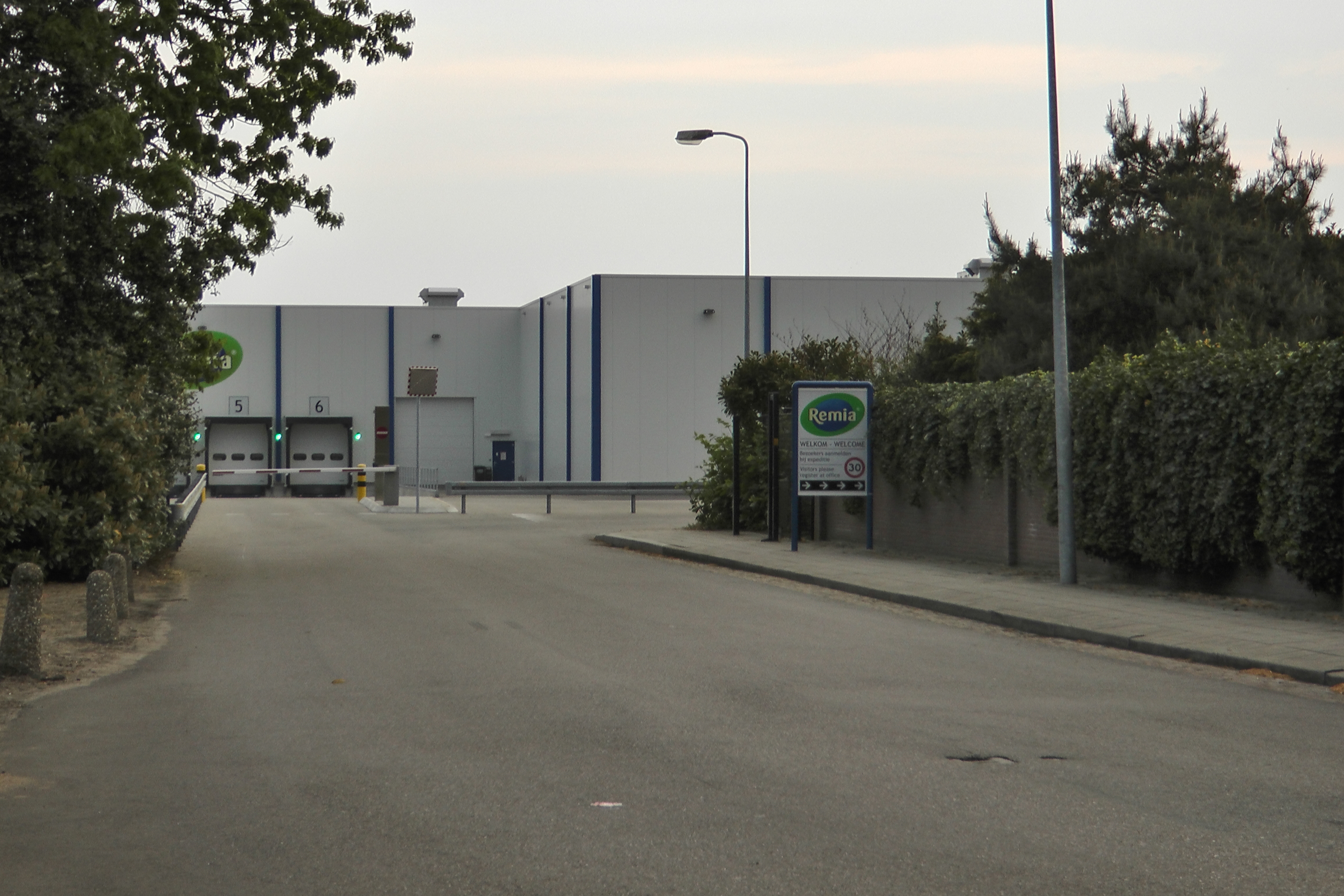 Remia in Den Dolder, Nederland, 2011.